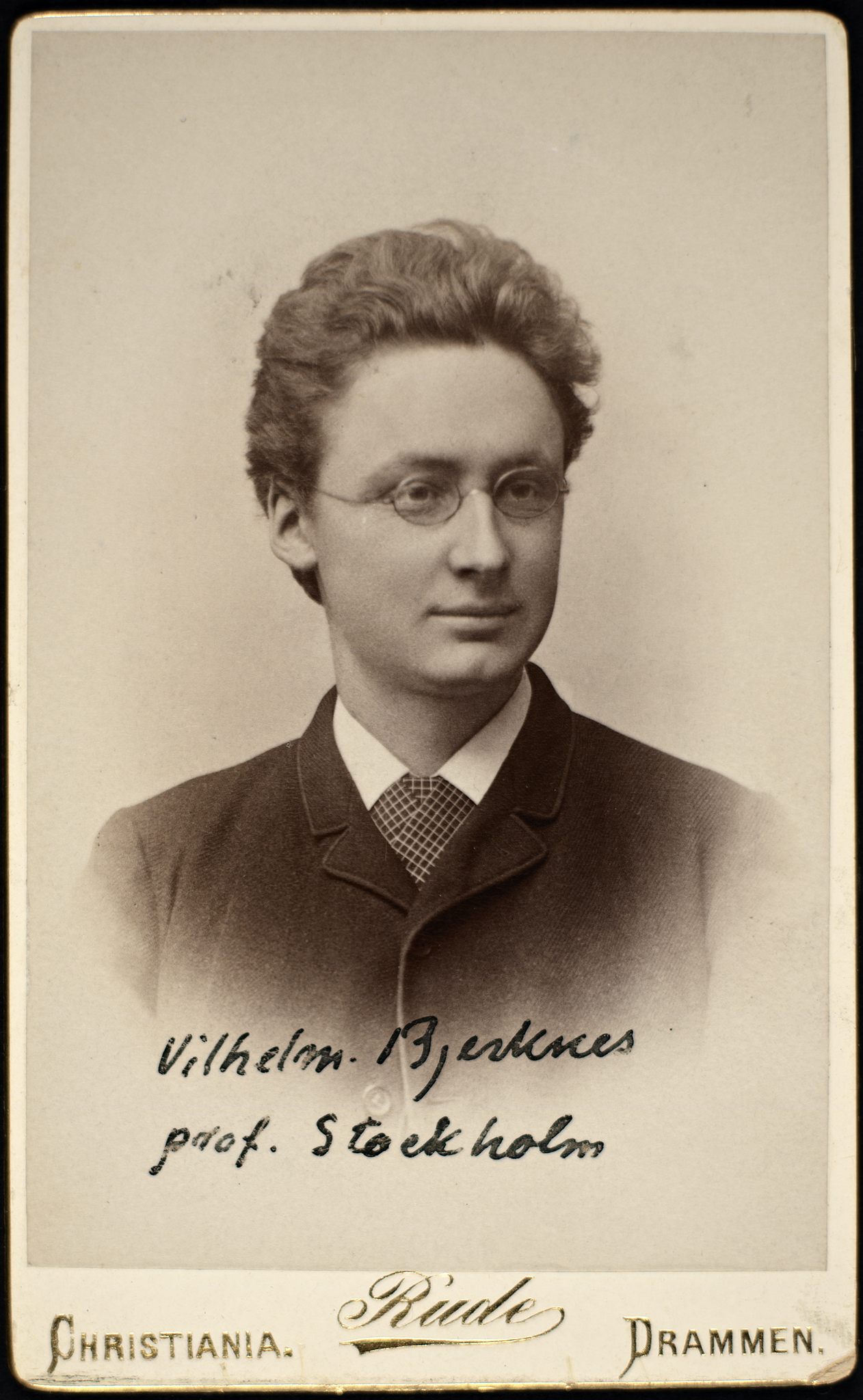 Tittel / Title: Portrett av Vilhelm Bjerknes (1862-1951) Beskrivelse / Description: Visittkort / carte de visite. Bjerknes var norsk fysiker og meteorolog og en av den moderne meteorologis grunnleggere. Vilhelm Bjerknes' hus på Blindern (Universitetet i Oslo) er oppkalt etter han. Dato / Date: ukjent / unknown Fotograf / Photographer: Christoffer Gade Rude (1839-1901) Eier / Owner Institution: Nasjonalbiblioteket / National Library of Norway Lenke / Link: Bildesignatur / Image Number: blds_01075